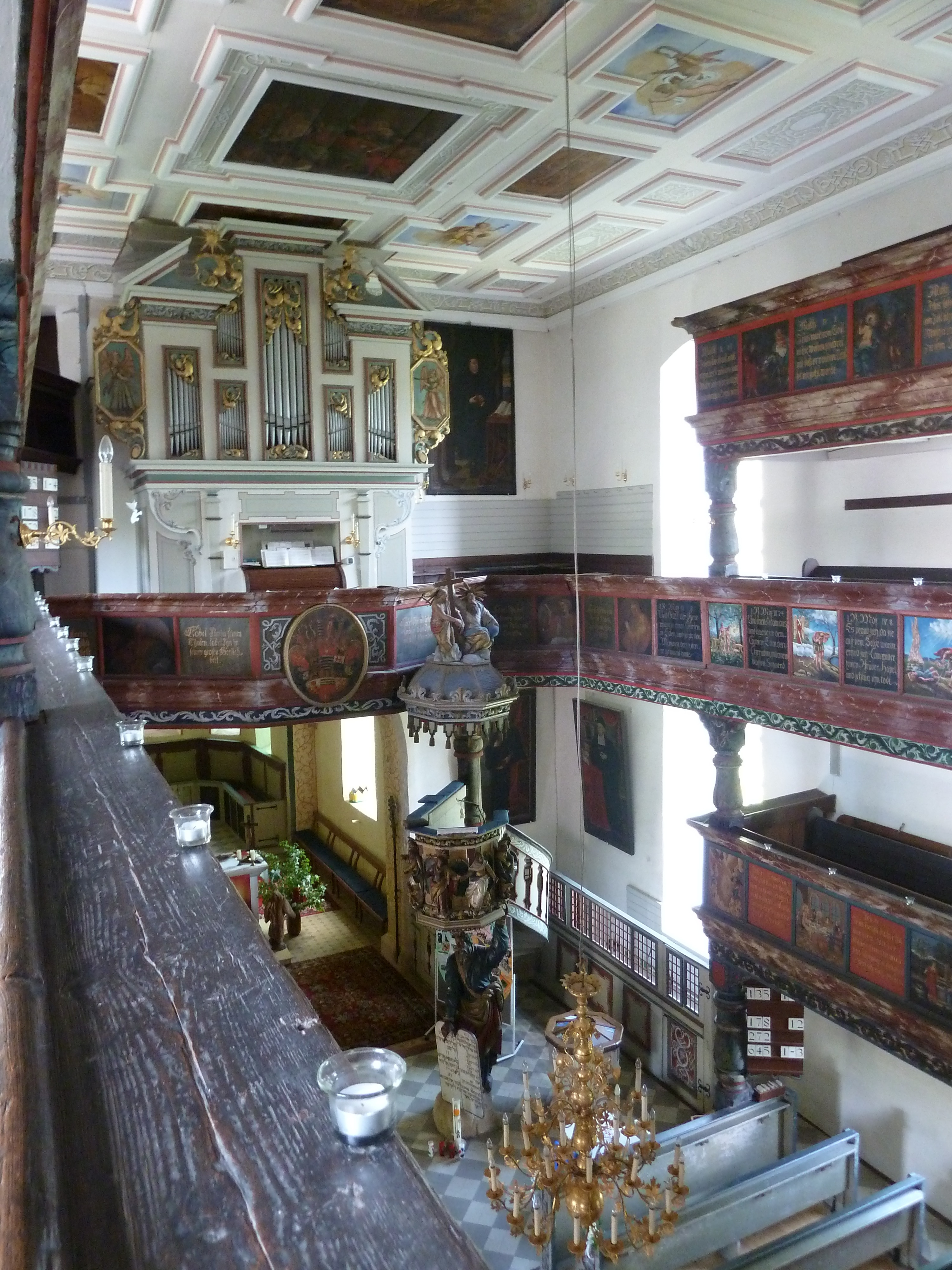 Innenansicht der Heilig-Geist-Kirche in Mupperg